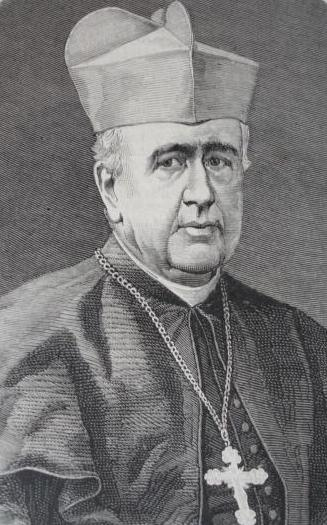 Cardenal Miguel Payá y Rico.